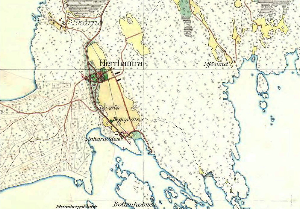 Häradsekonomiska kartan över Herrhamra gård (kartan är beskuren)